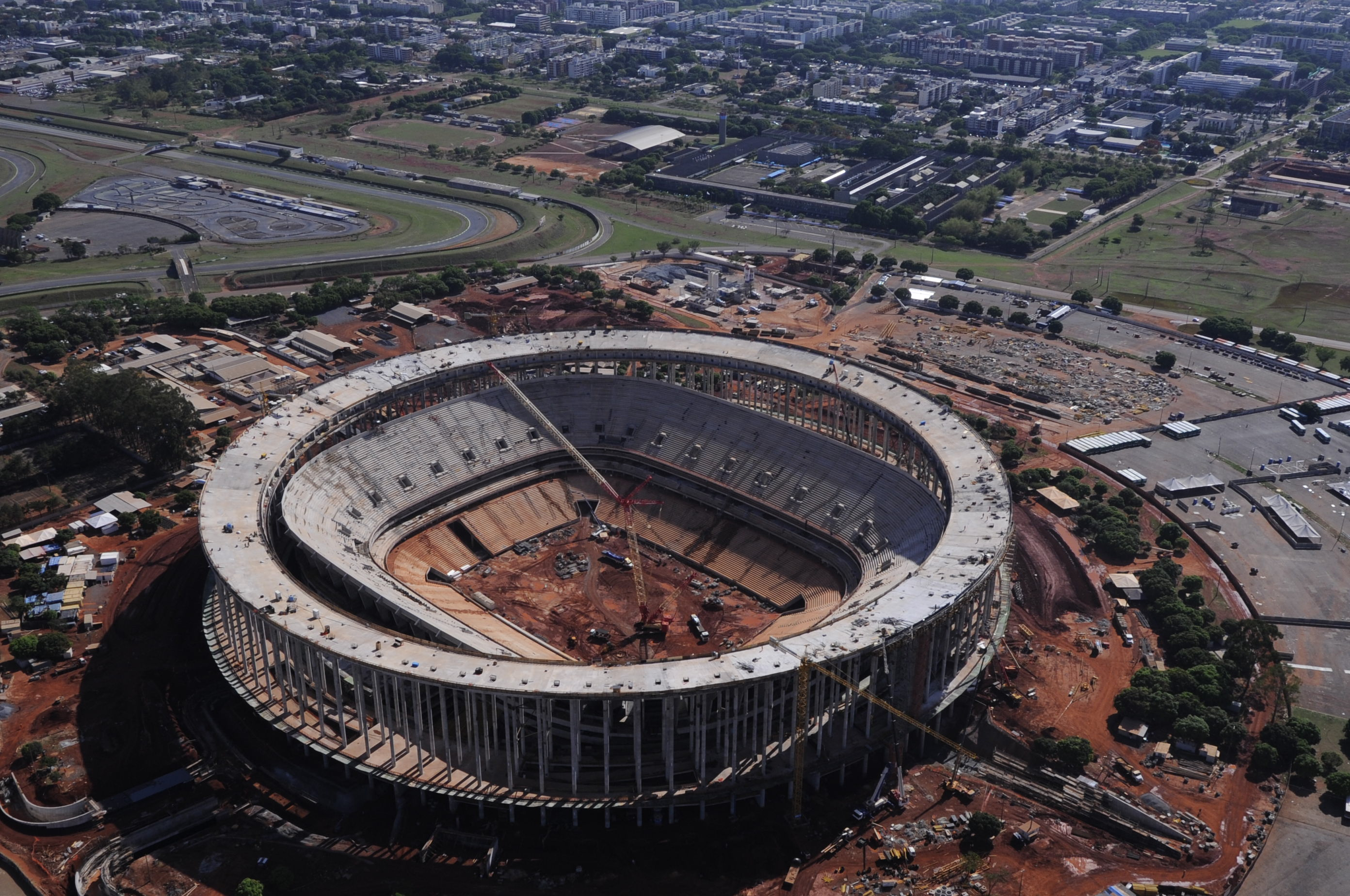 Vista aérea do Estádio Nacional de Brasília Mané Garrincha. Foto: Geraldo Magela/Agência Senado